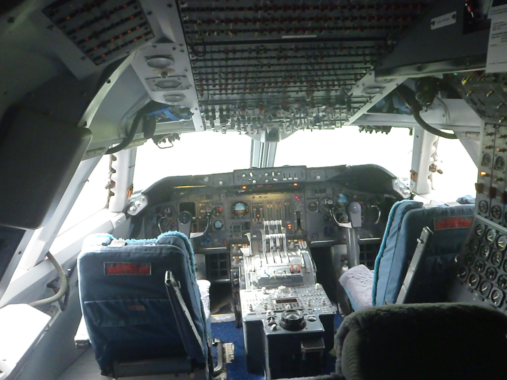 de cockpit van ph-buk